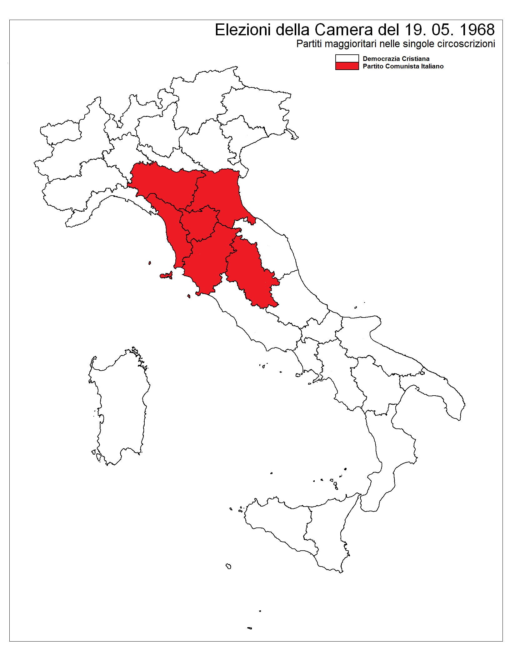 Partiti maggioritari nelle singole circoscrizioni nelle elezioni del 1968.